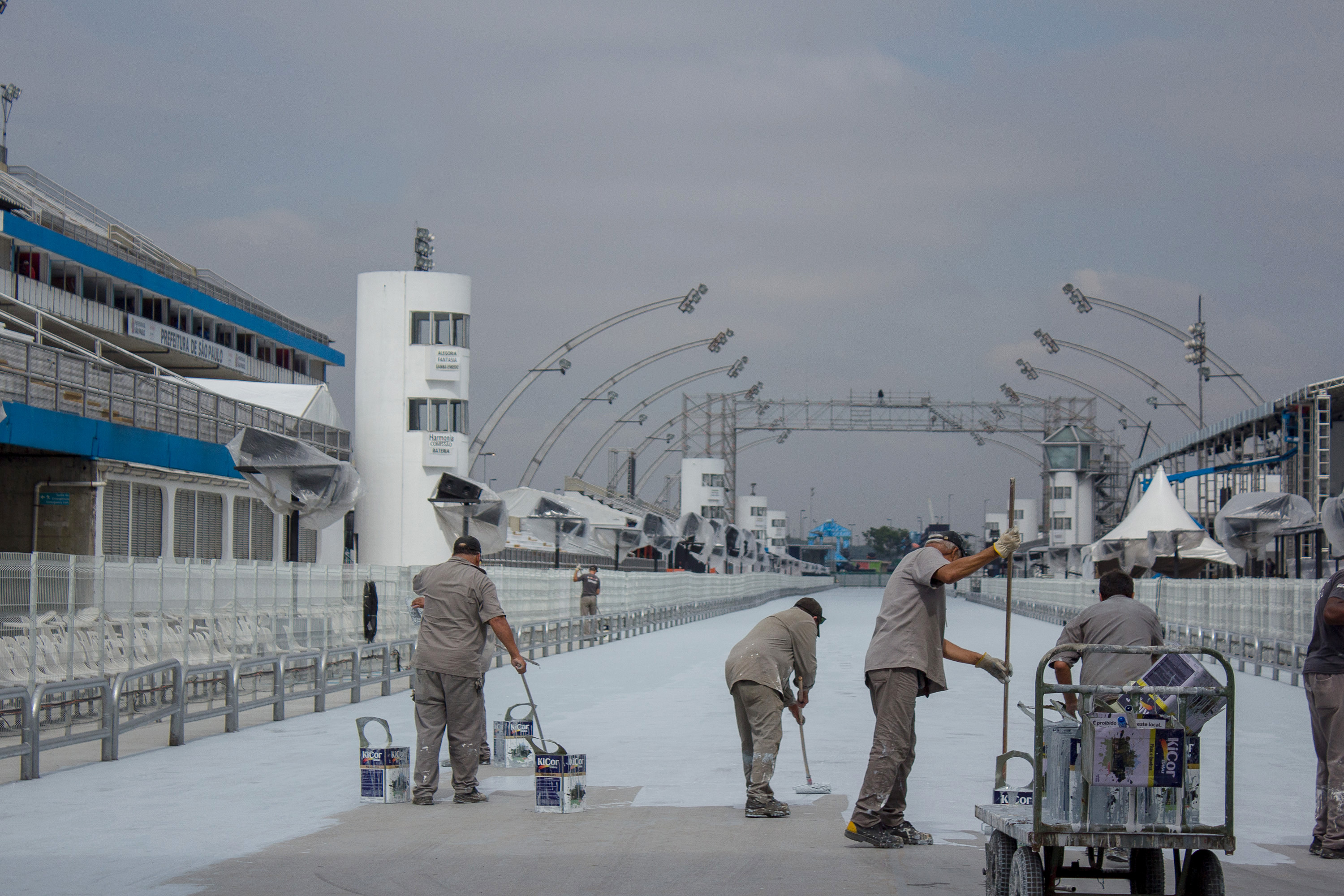 CARNAVAL 2013 - PREPARATIVOS - SÃO PAULO - 06/02/2013 - Começam os preparativos para os desfiles das escolas de samba de São Paulo, integrantes das escolas começam a motagem dos carros alegóricos no sambódromo do Anhembi. Foto: Jardiel Carvalho/CPN